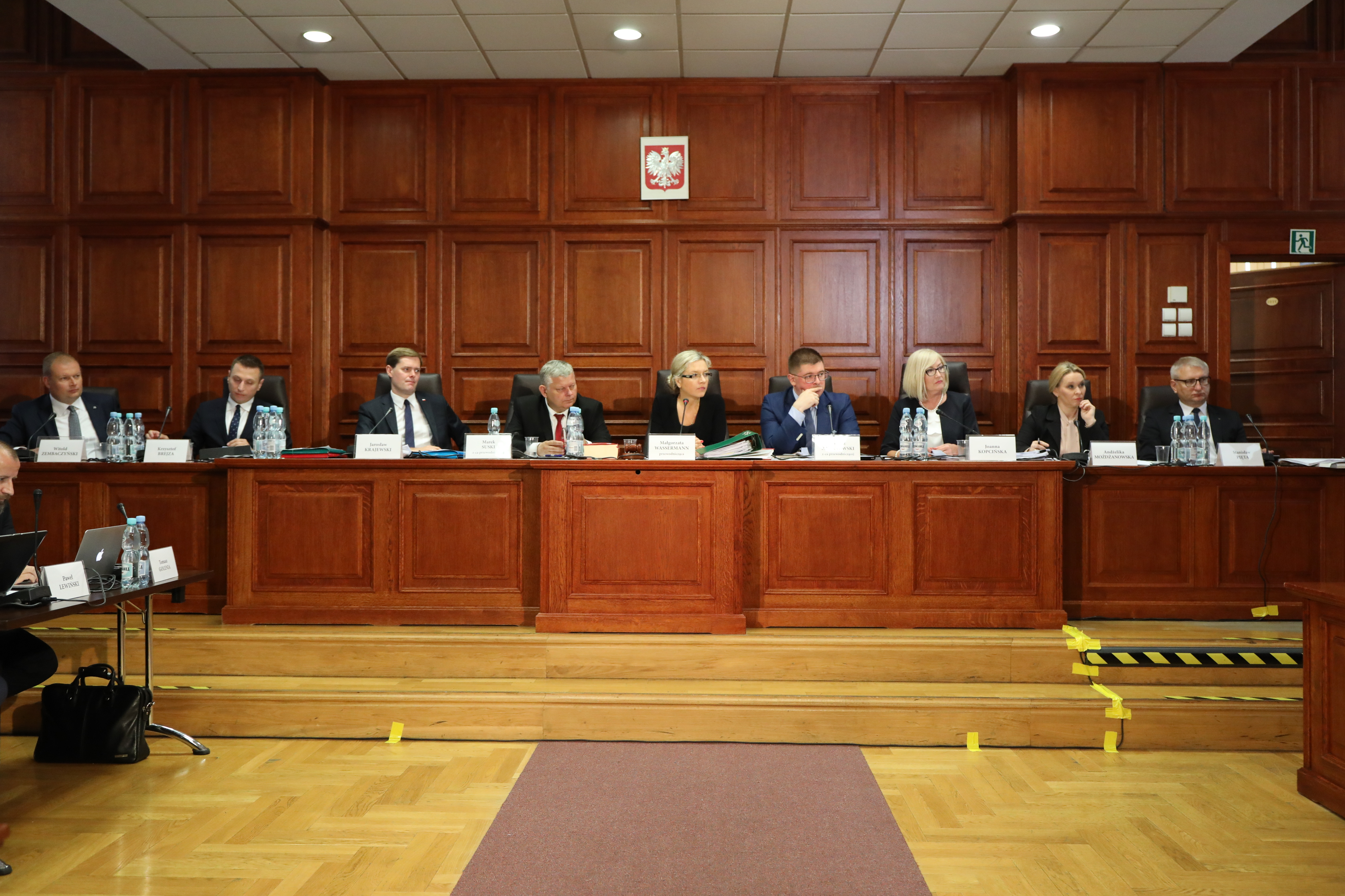 Komisja Śledcza ds. Amber Gold, przesłuchanie Marcina P. w Sądzie Okręgowym w Warszawie.